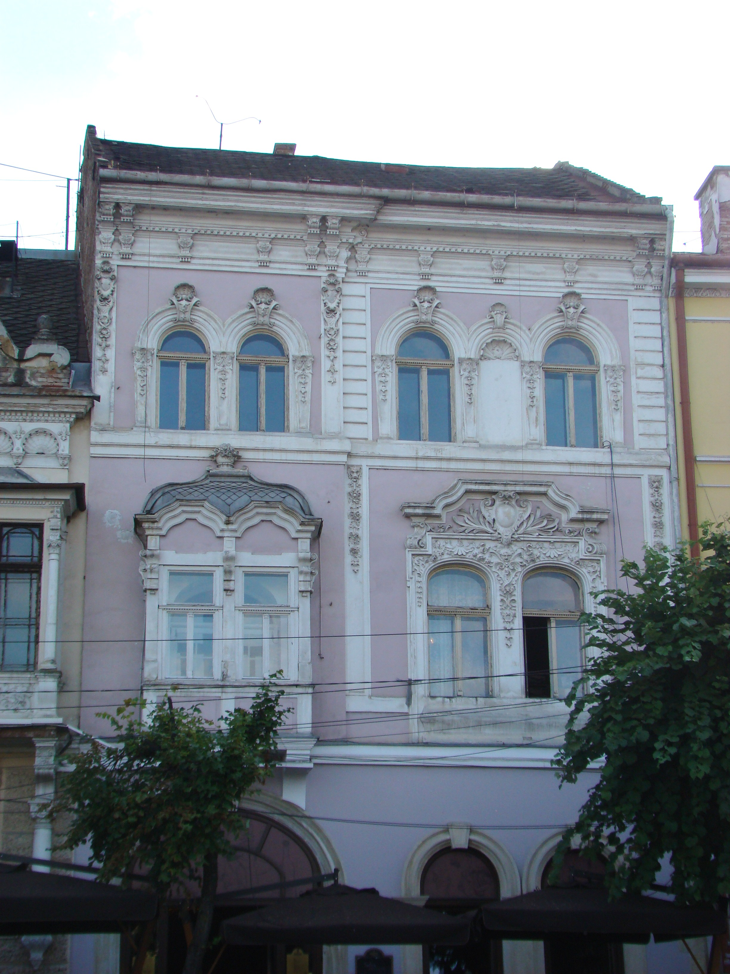 Clădire monument istoric, Piața Unirii, nr.12